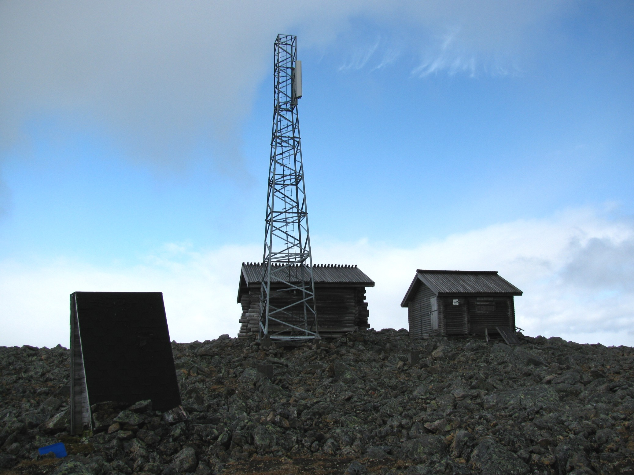 Ridnitšohkkan tukiasema tunturin itäisellä huipulla